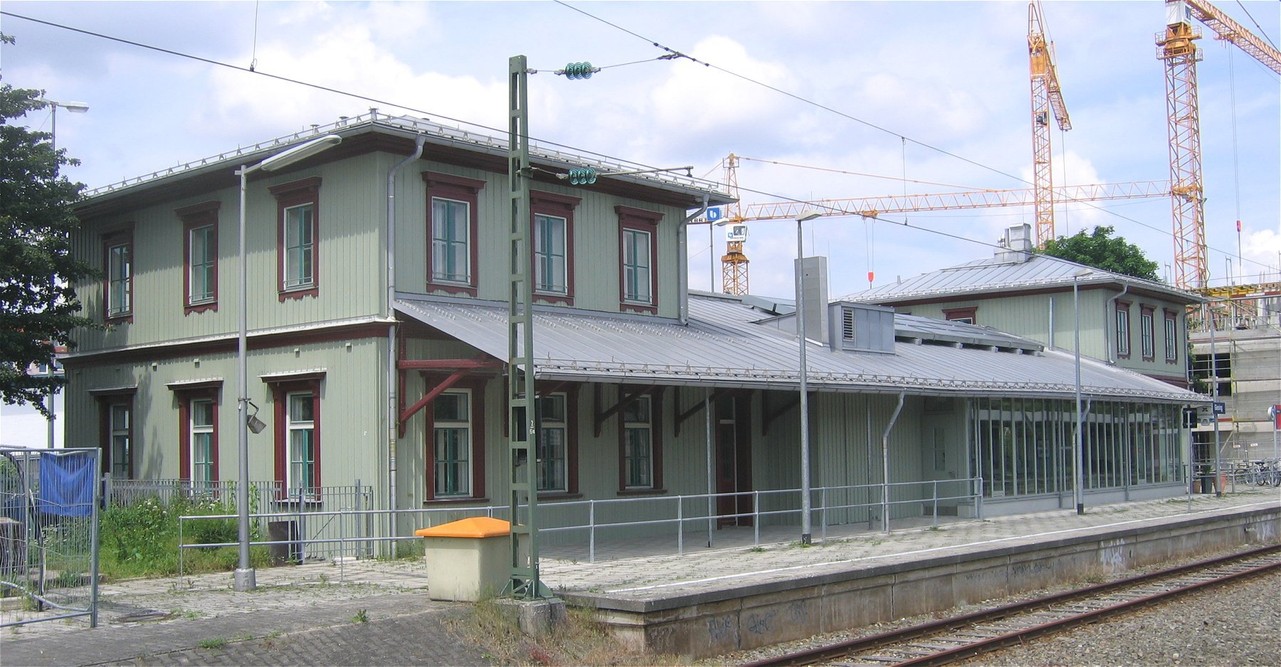 Giesinger Bahnhof in München auf der Bahnsteigseite. Im Vordergrund das normalerweise unbenutzte Gleis 1.